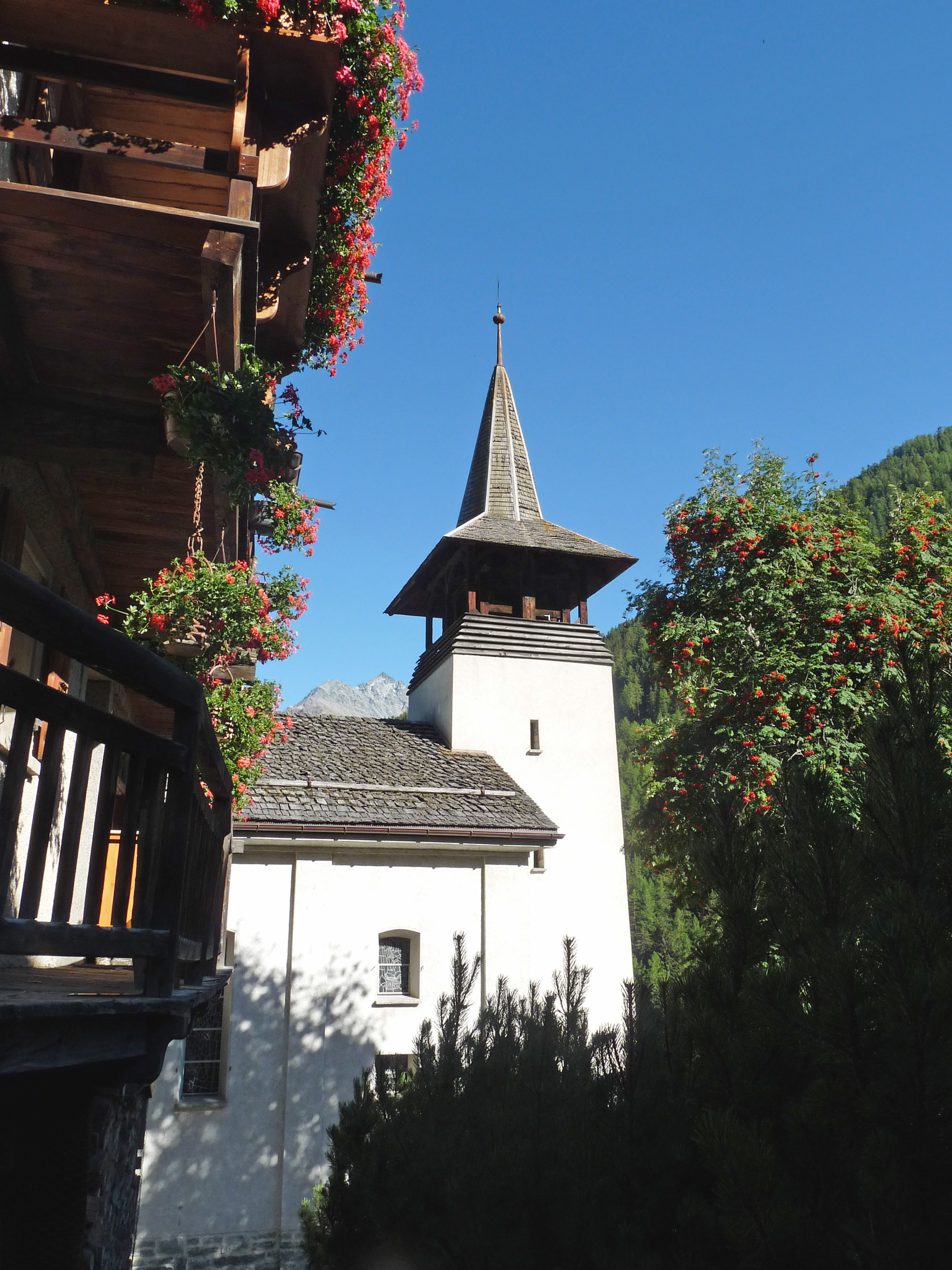 Eglise de Grimentz (Valais, Suisse)